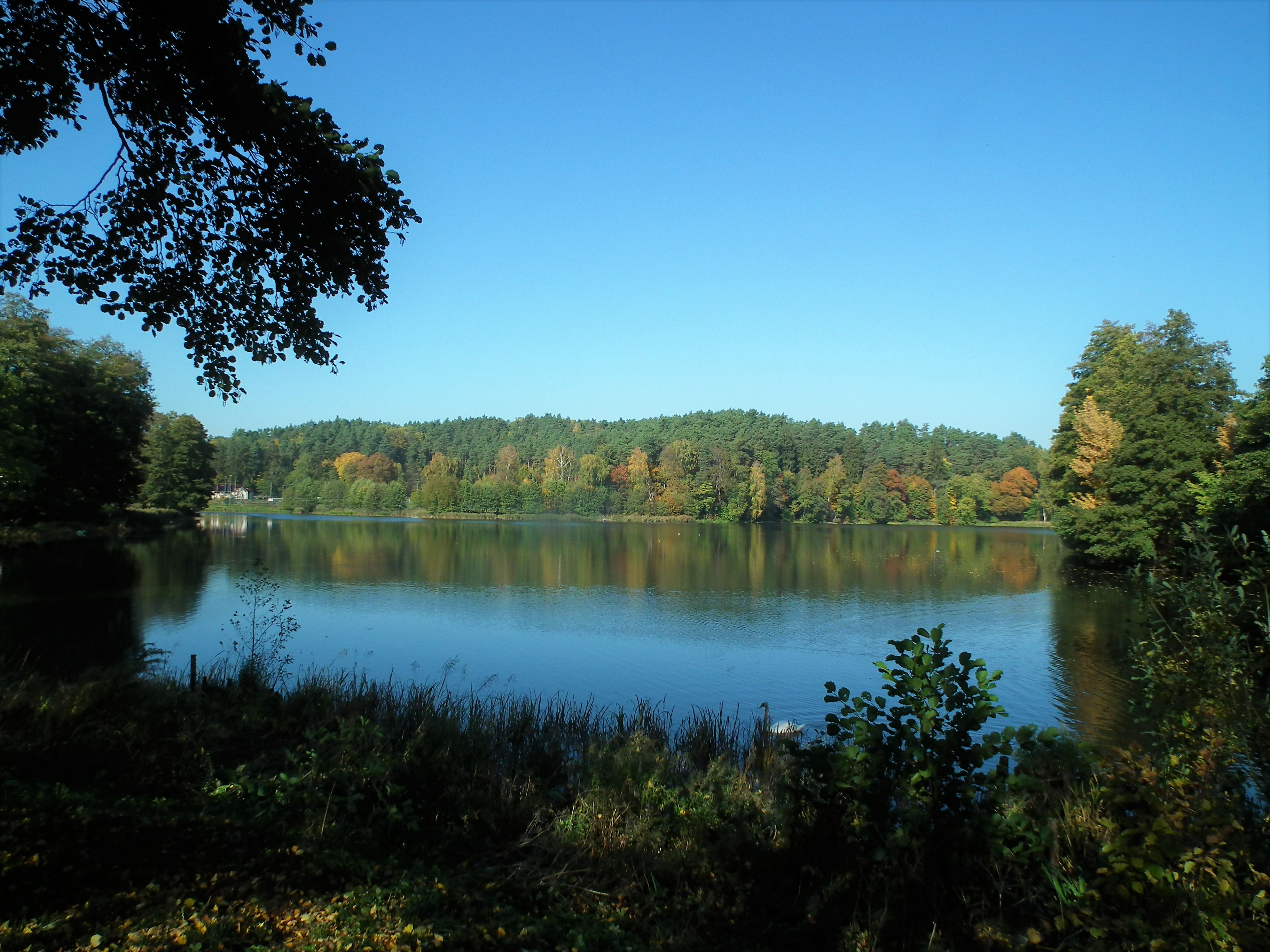 Jezioro Młyńskie (Ogórkowe) w Kaliszu Pomorskim.